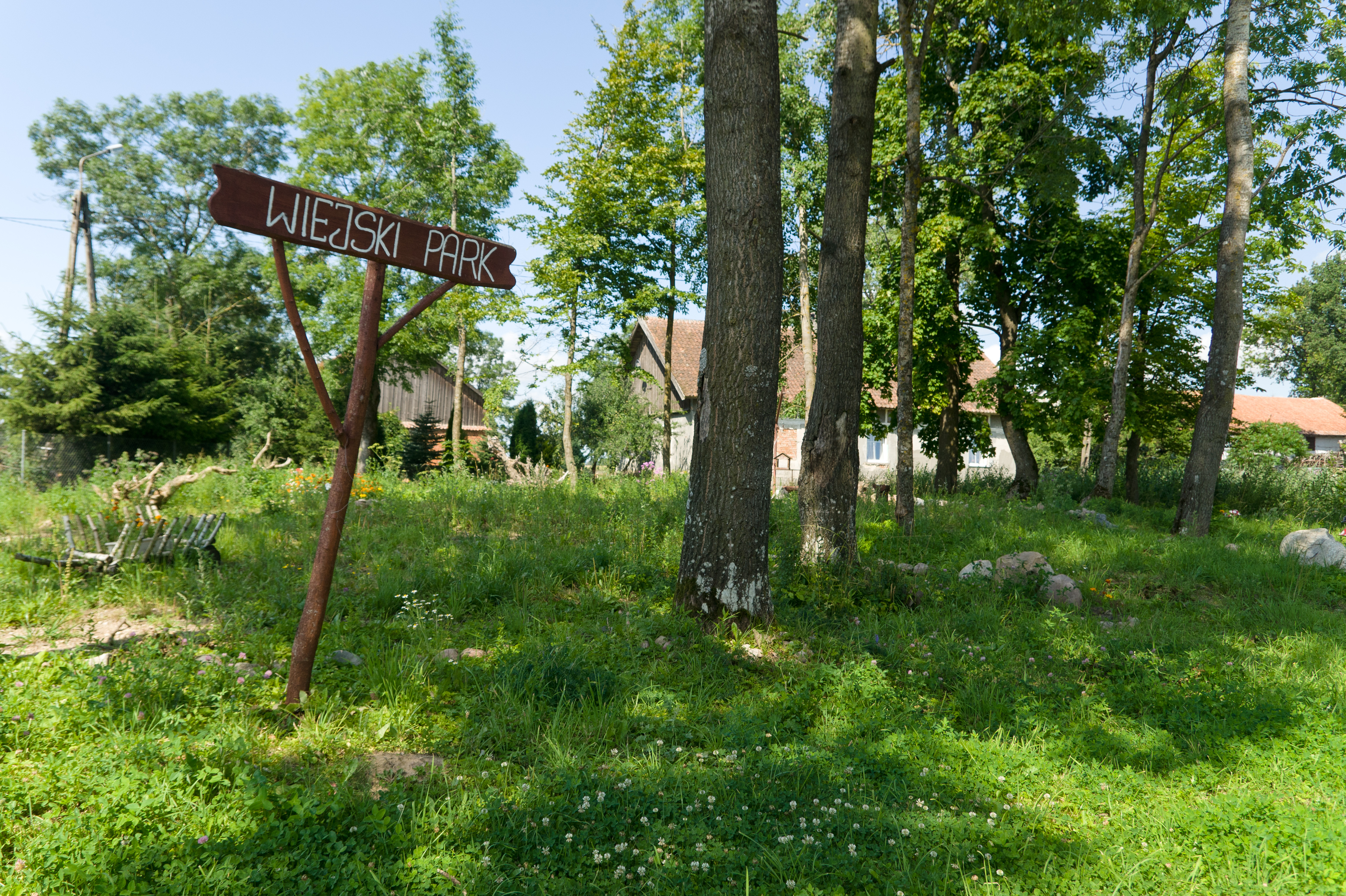 Park wiejski w Janikowie (województwo warmińsko-mazurskie).